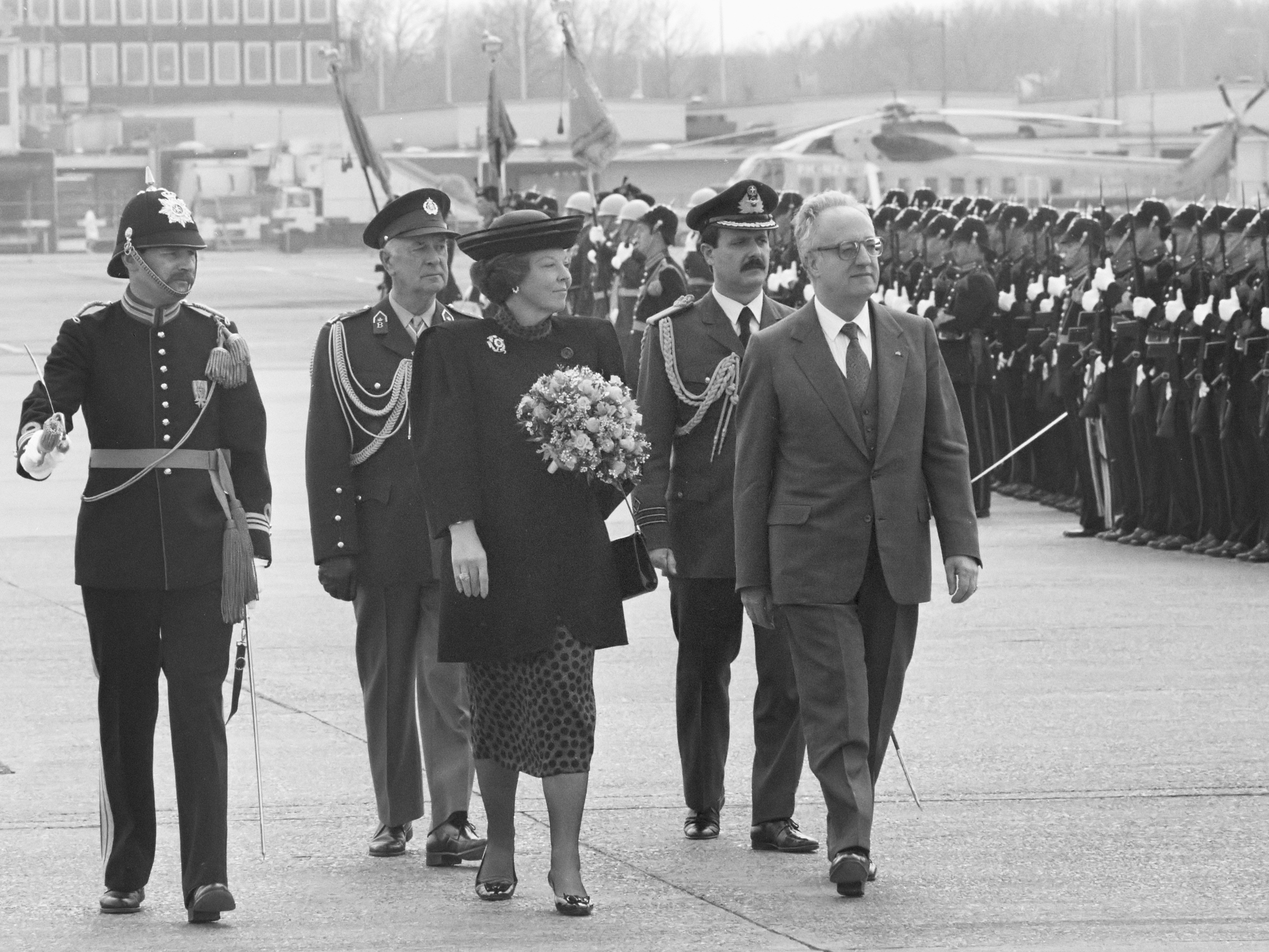 Staatsbezoek van de Griekse President Sartzetakis en zijn echtgenoot 17 april 1989